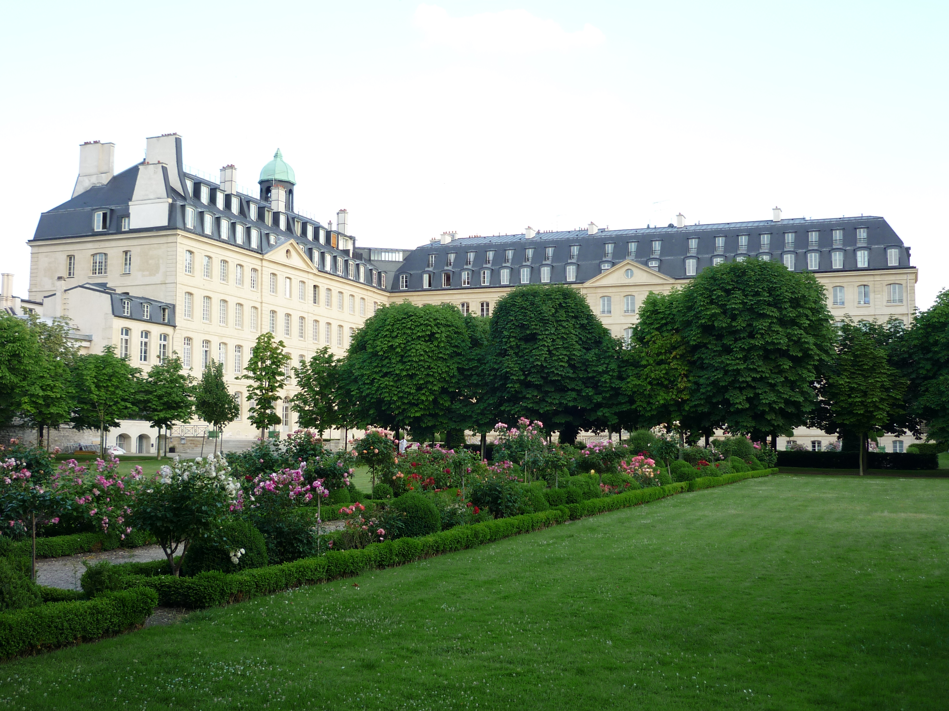 Икона за междуезикови препратки.